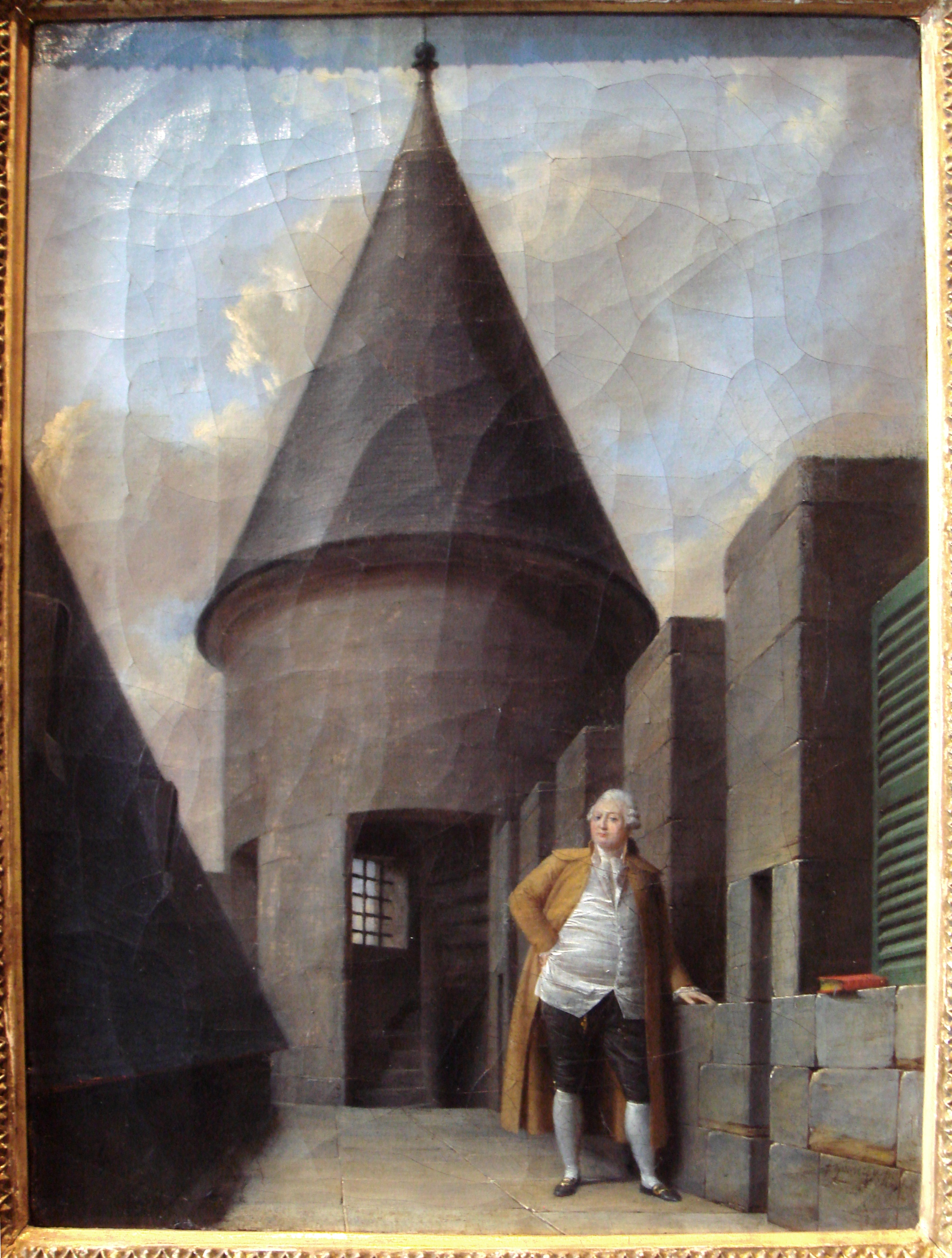 Louis XVI à la Tour du Temple